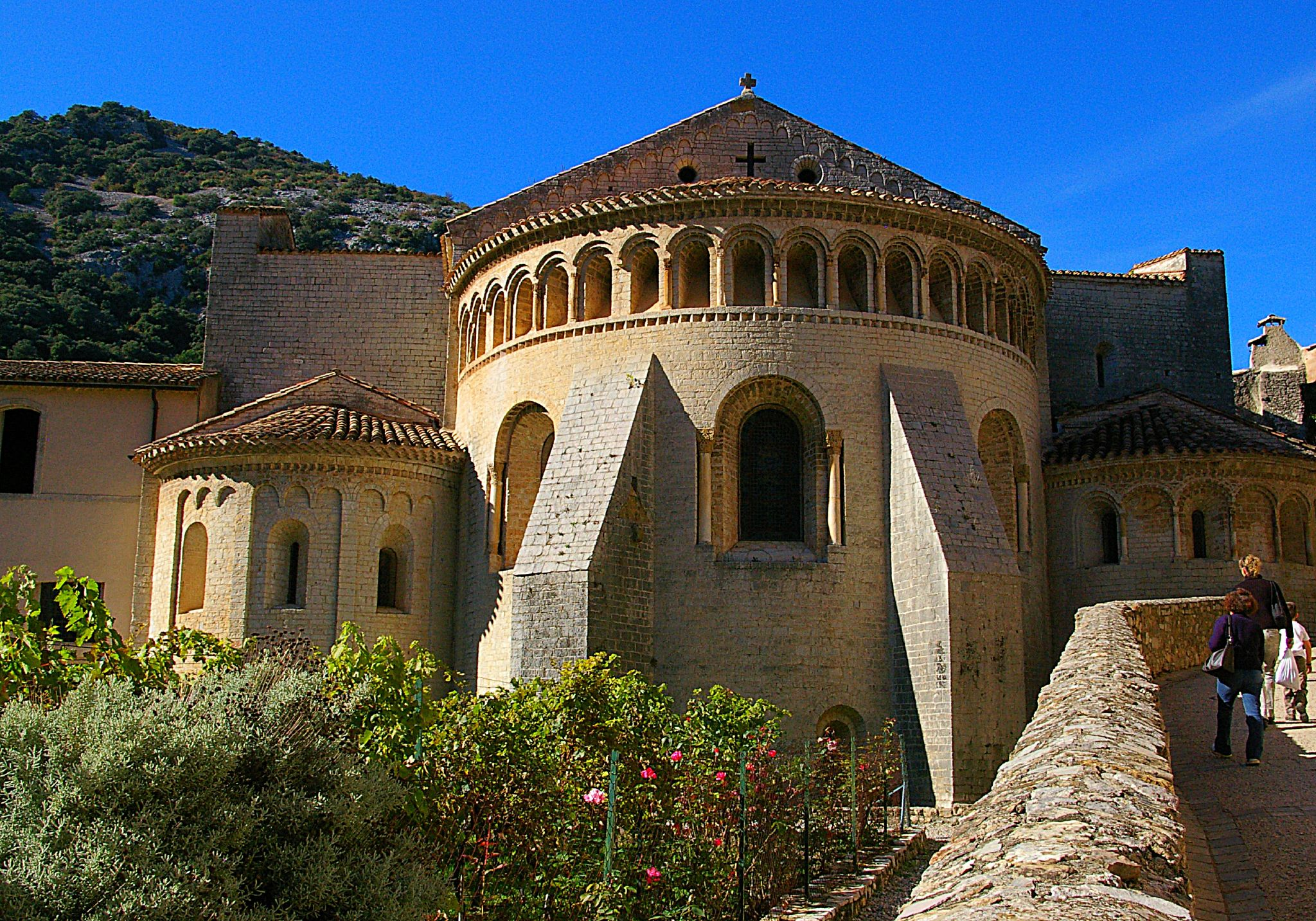 Saint Guilhem le désert, Hérault, France